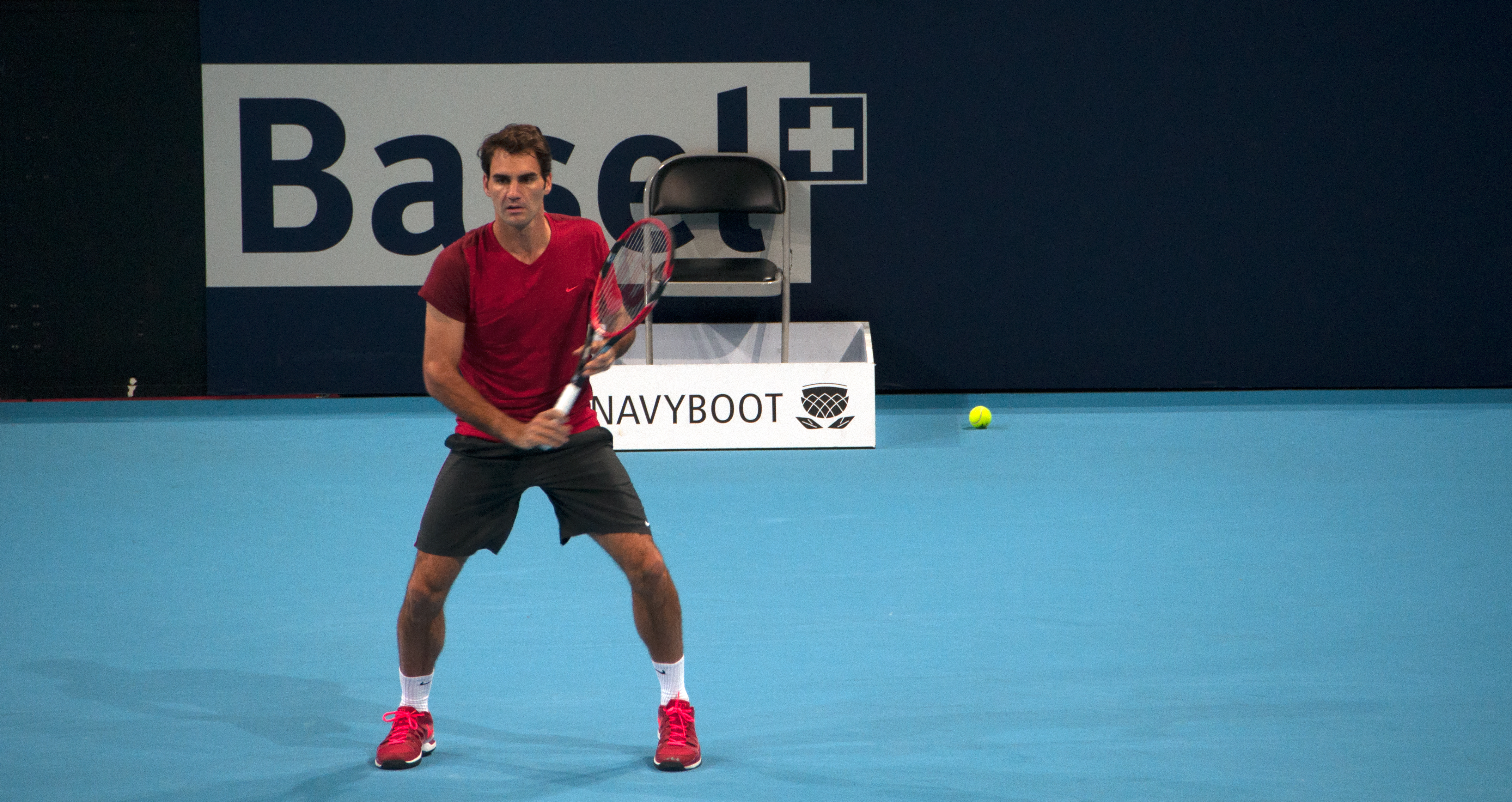 Basel Swiss Indoors 2014